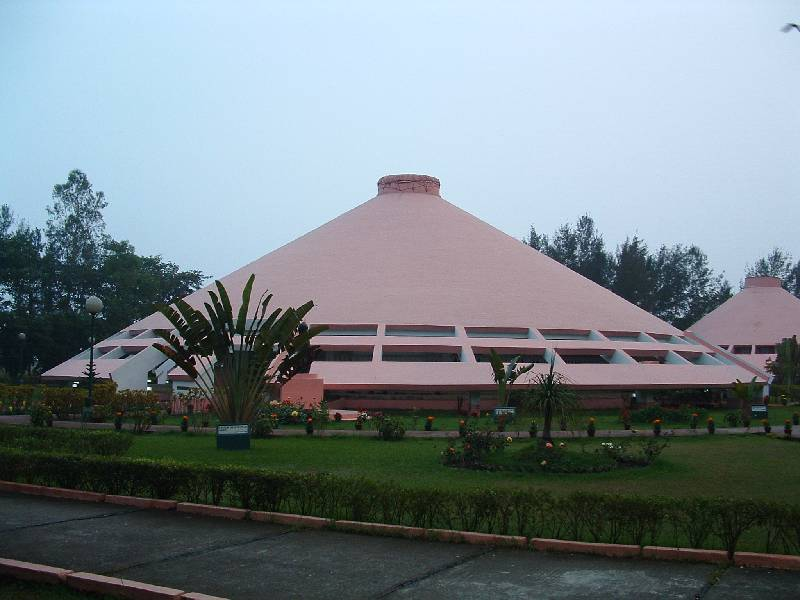 MCHV